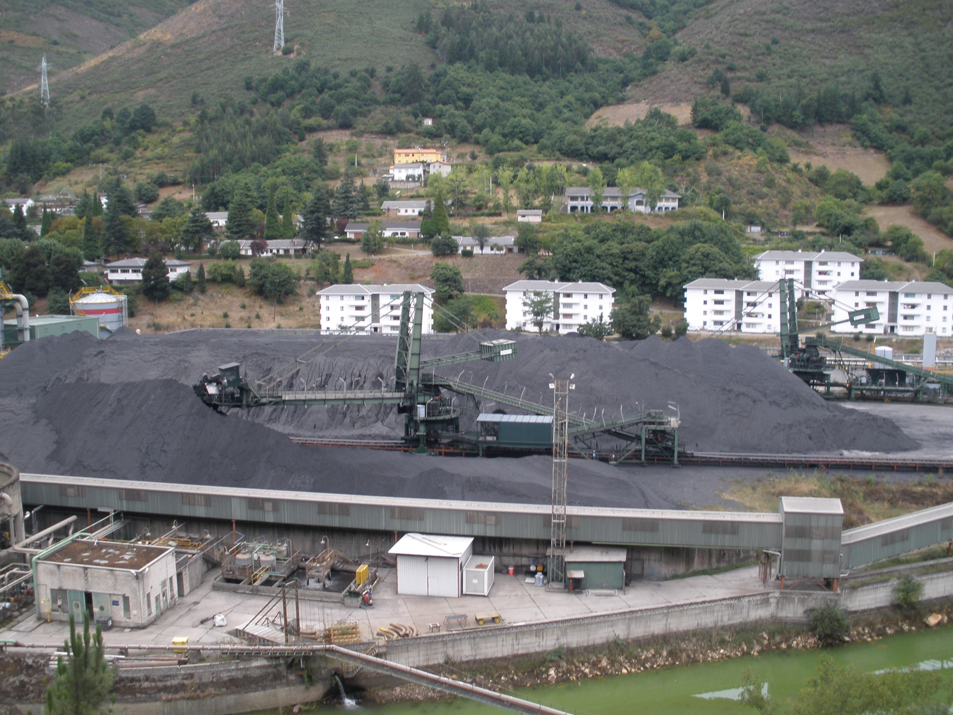 Parque de carbones de la térmica del Narcea.